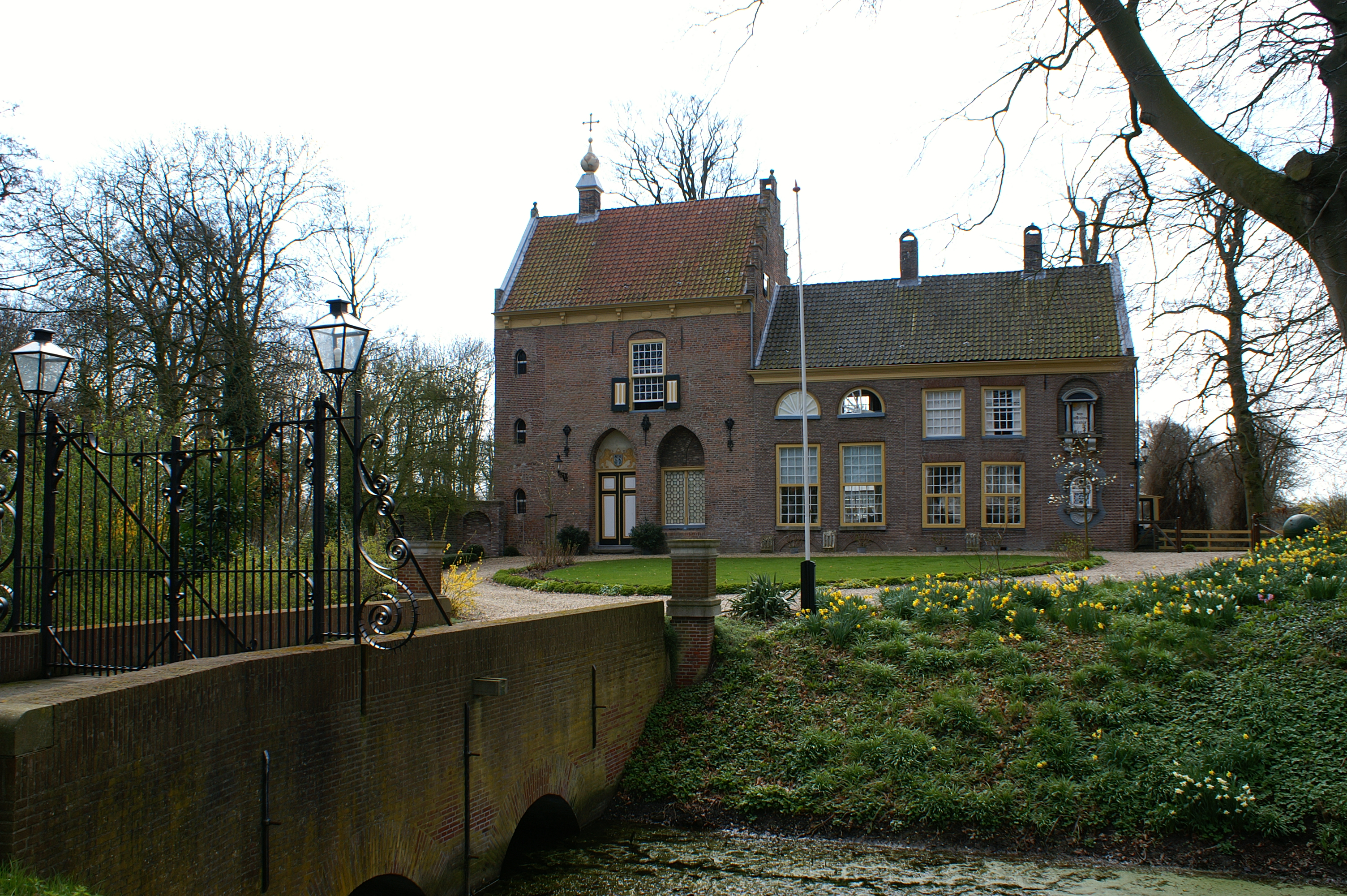 't Spijker te Brakel (Geld.) met toegangsbrug.